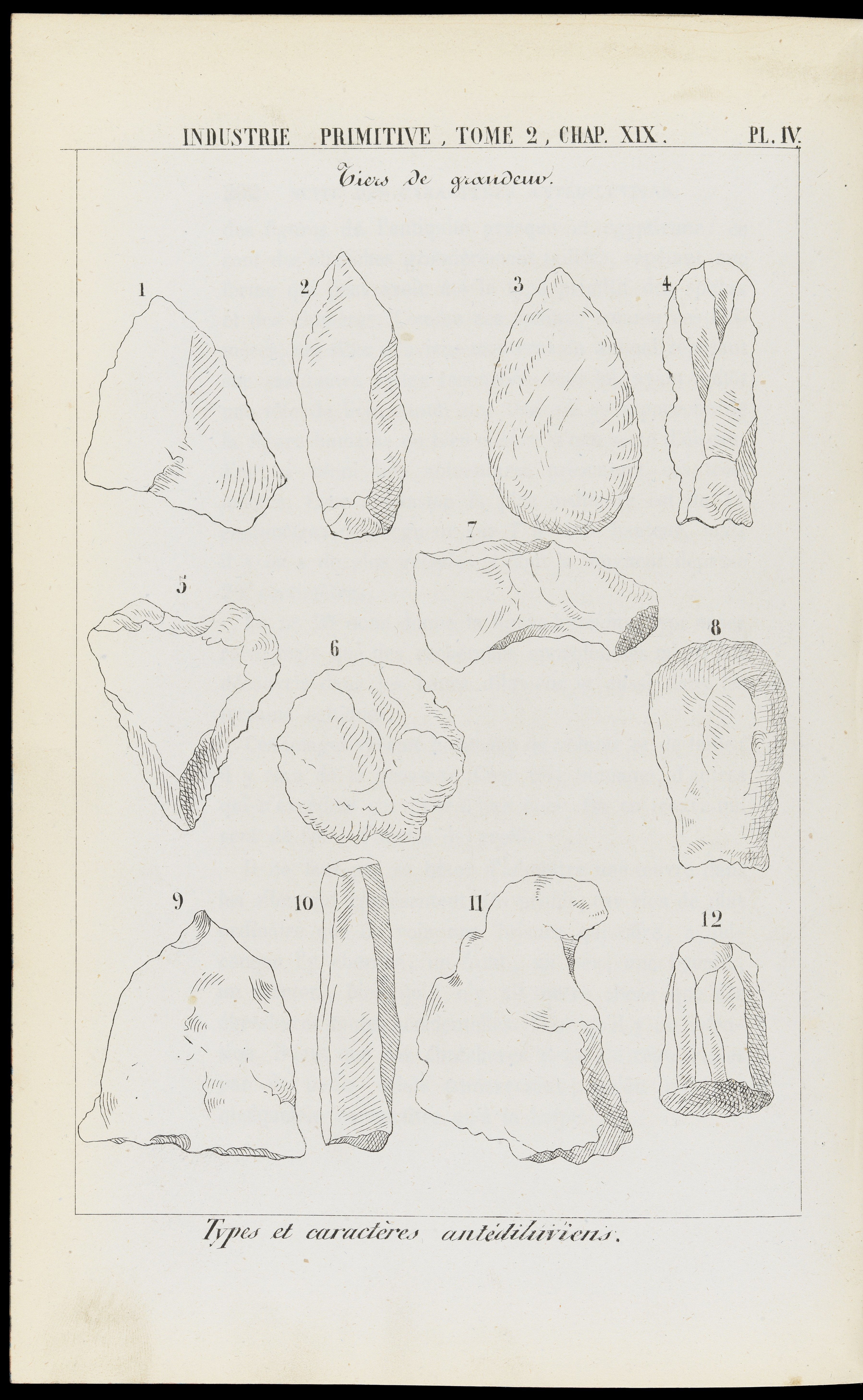 "Antiquités celtiques et antédiluviennes. Mémoire sur l'industrie primitive et les arts à leur origine", by M. Boucher de Perthes. "Types et caracteres antediluviens" (Diagrams showing the characteristics of antediluvian flints), Chapter XIX, Pl. IV, between pp.202-203, Volume II Rare Books Keywords: Archaeology